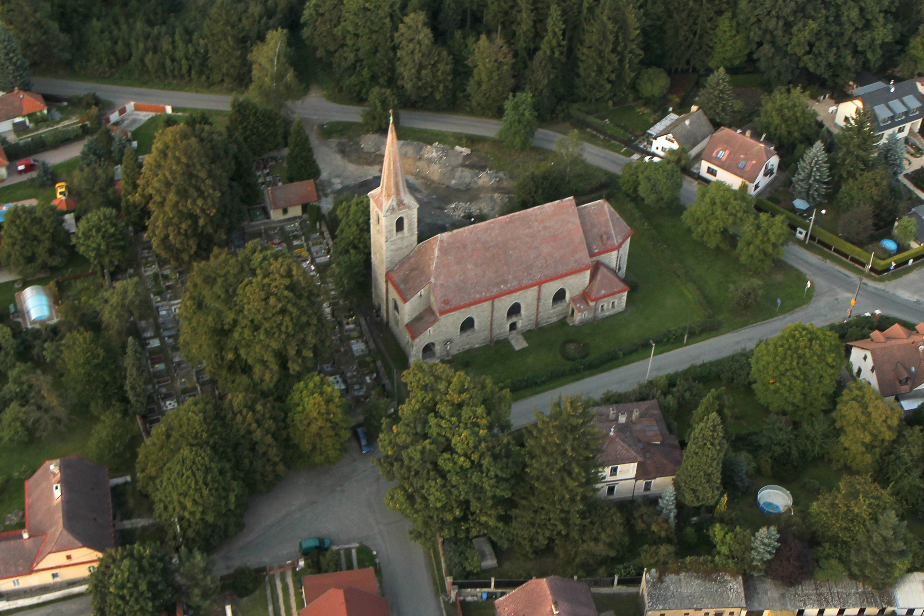 Kostel Nanebevzetí Panny Marie, severní část obce, Mukařov